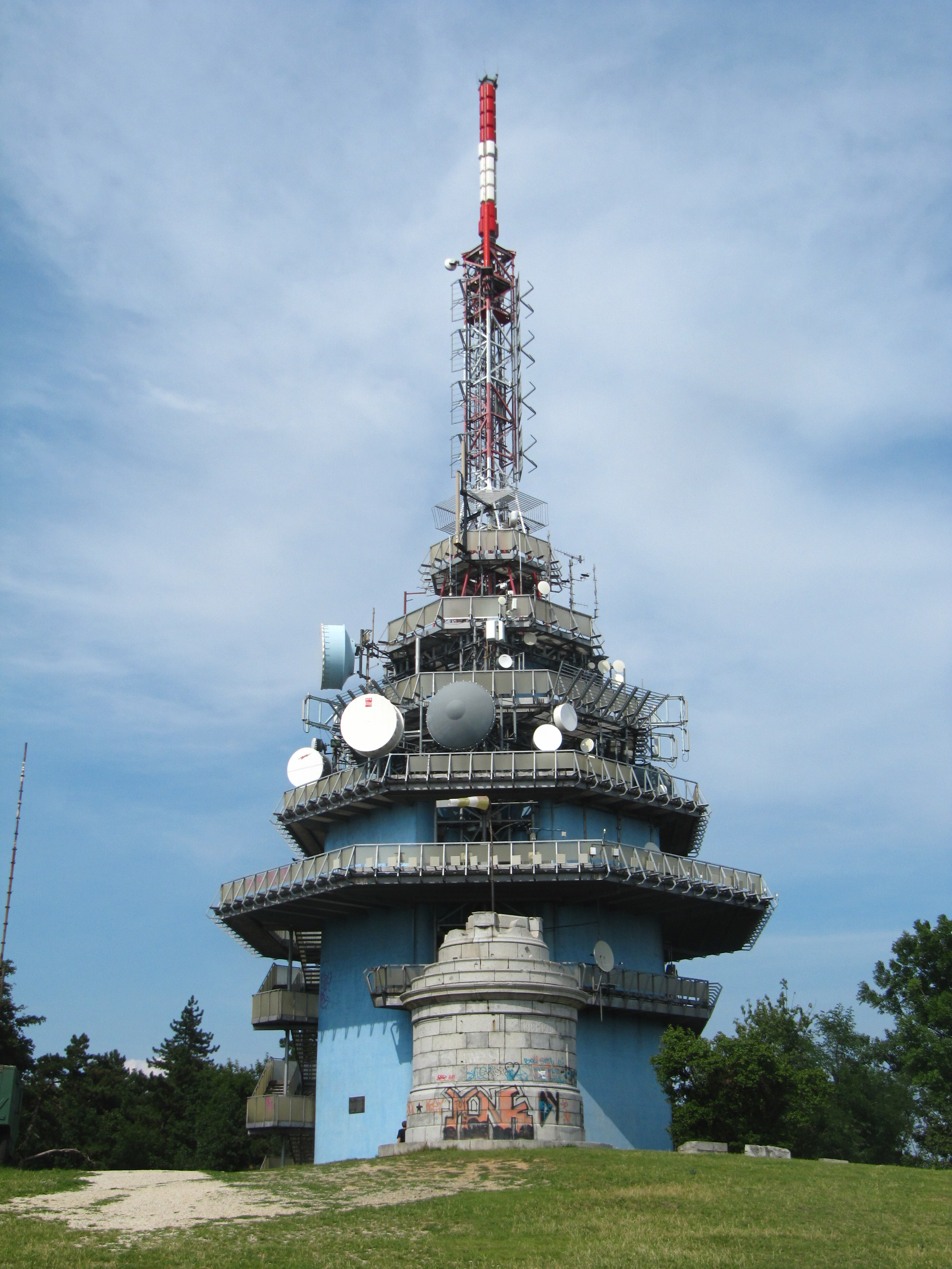 Vysielač Zobor v júli 2012.